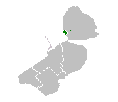 Made by nds-Gebruker:Grönneger 1 't Kleane grune gebied is Tollebeek